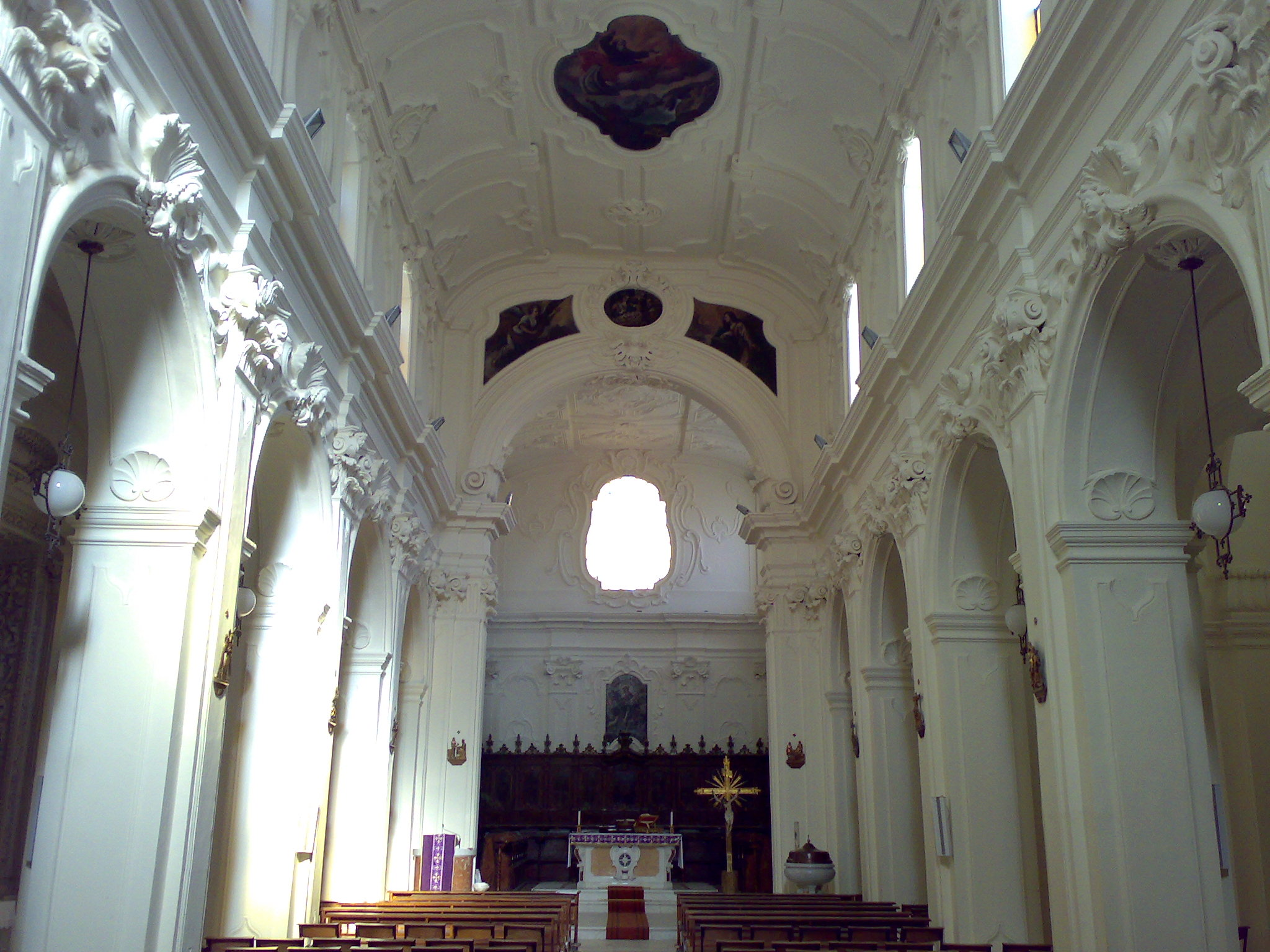 Chiesa del Carmine Nardò Interno